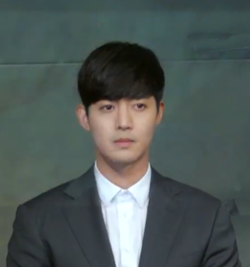 23일 오후 서울시 영등포구 타임스퀘어 아모리스홀에서 KBS W 새 수목드라마 '시간이 멈추는 그때' 제작발표회가 열렸다. 이날 김현중, 안지현, 인교진, 임하룡, 주석태 배우가 참석해 각자 맡은 배역에 대해 설명을 하고 있다.